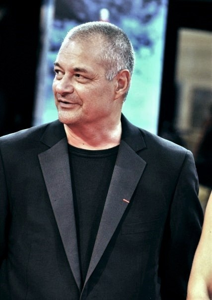 Jean-Pierre Jeunet au festival de Deauville 2009